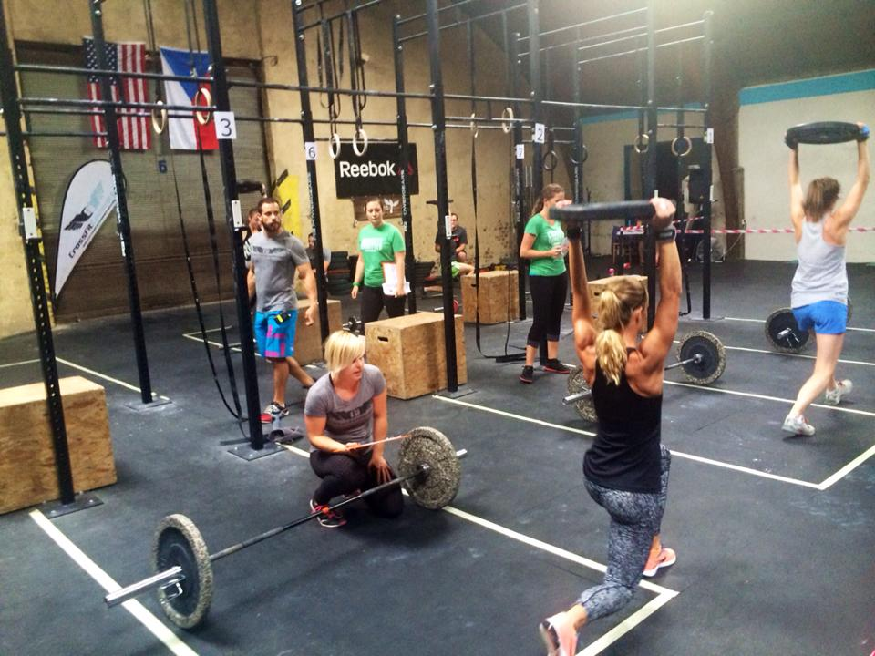 Crossfit tělocvična v Praze